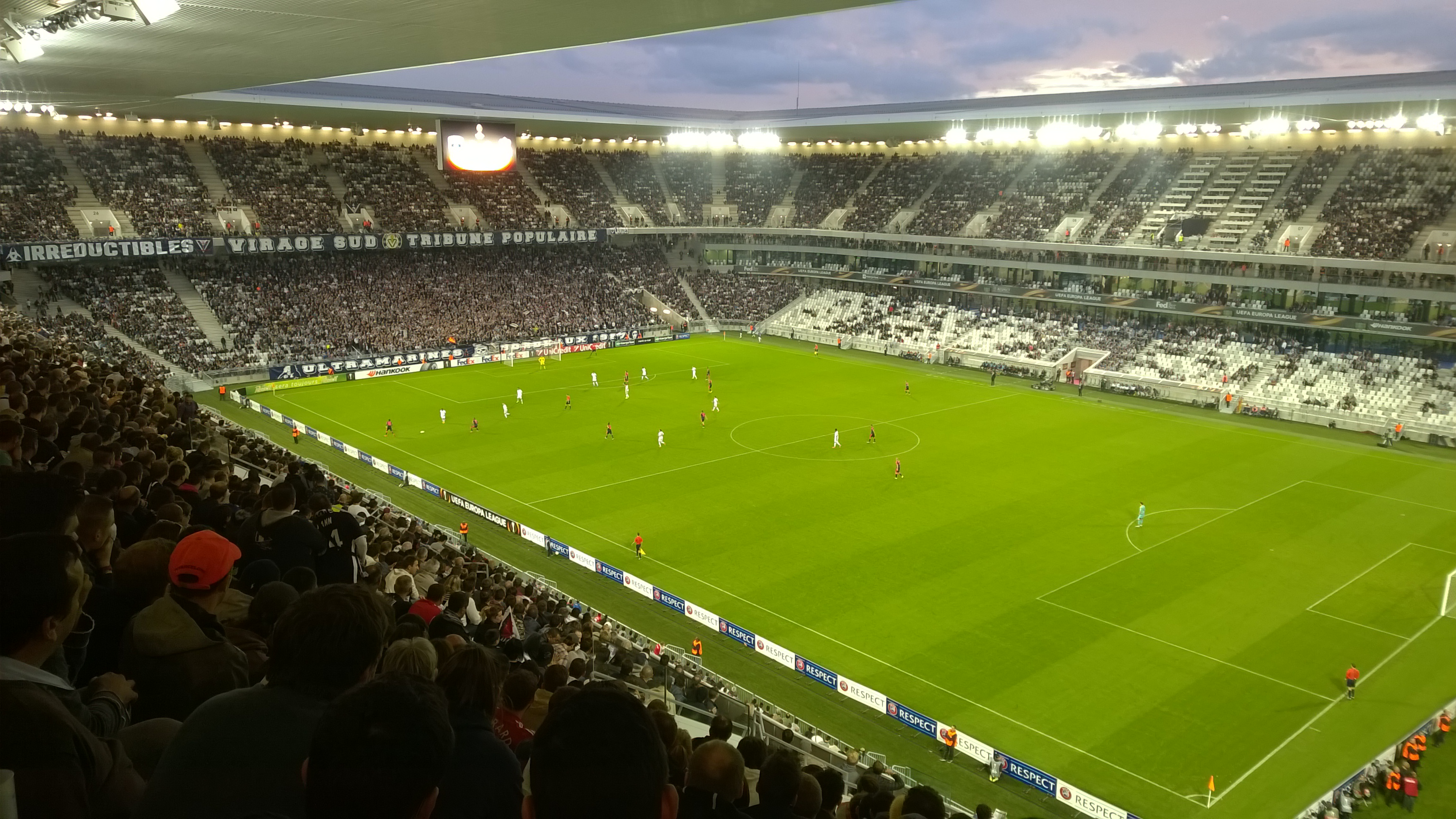 Match de football entre les Girondins de Bordeaux et le Liverpool FC comptant pour la Ligue Europa au stade MATMUT Atlantique le 17 septembre 2015.